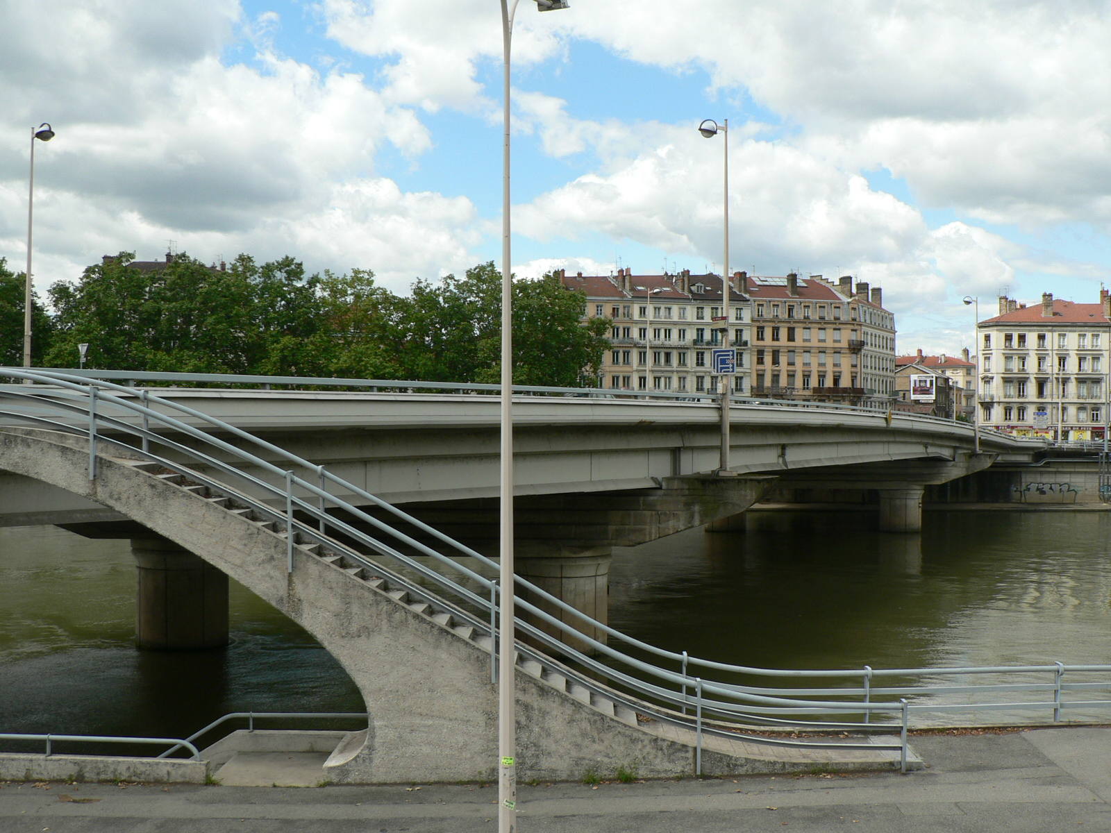 Ponts de Lyon - Pont Clémenceau